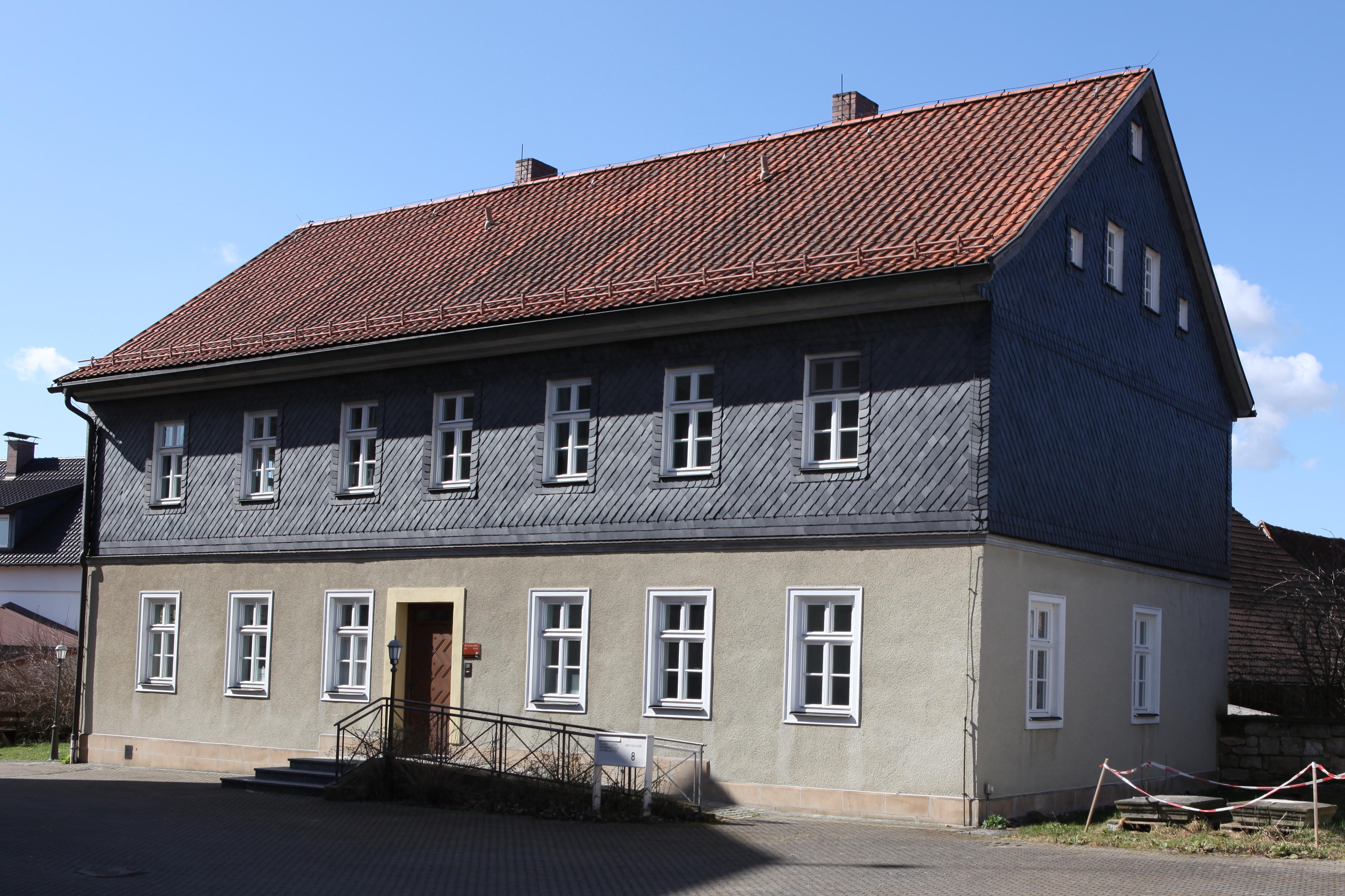 Unterlauter Alte Schule 1861